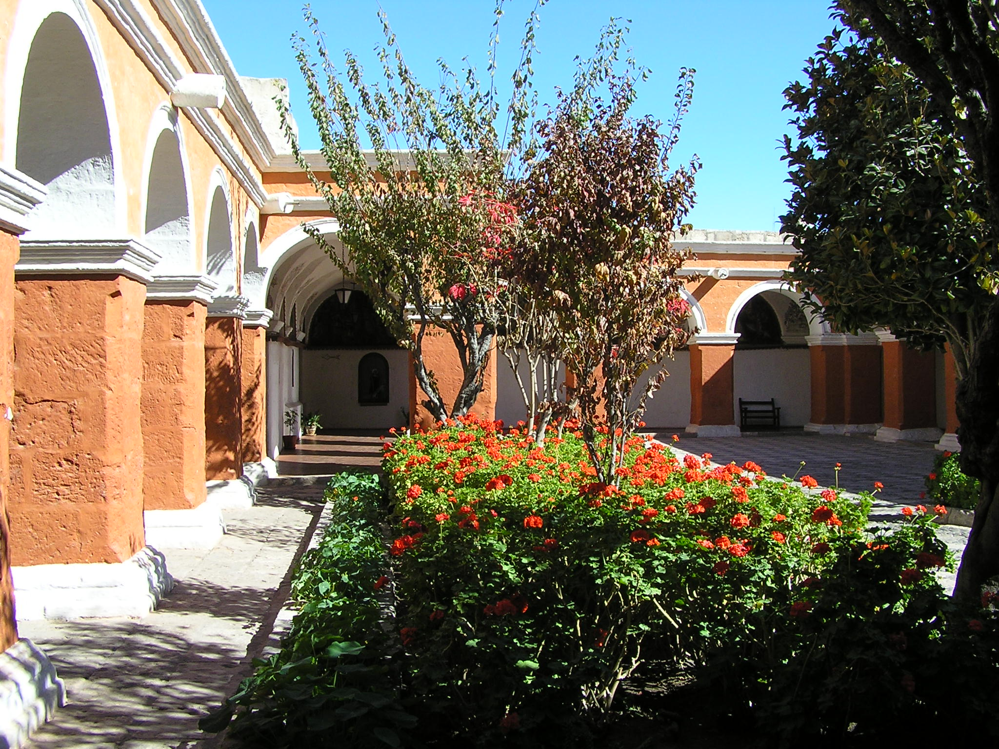 Arequipa 2005